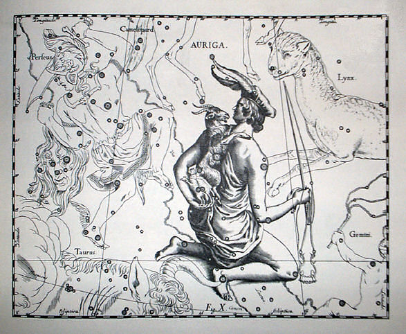 Tavola X del terzo volume "Firmamentum Sobiescianum, sive uranographia" dell'opera "Prodromus Astronomia" di Johannes Hevelius, pubblicato nel 1690 a Danzica. La tavola riproduce la costellazione "Auriga" dell'Emisfero Boreale.